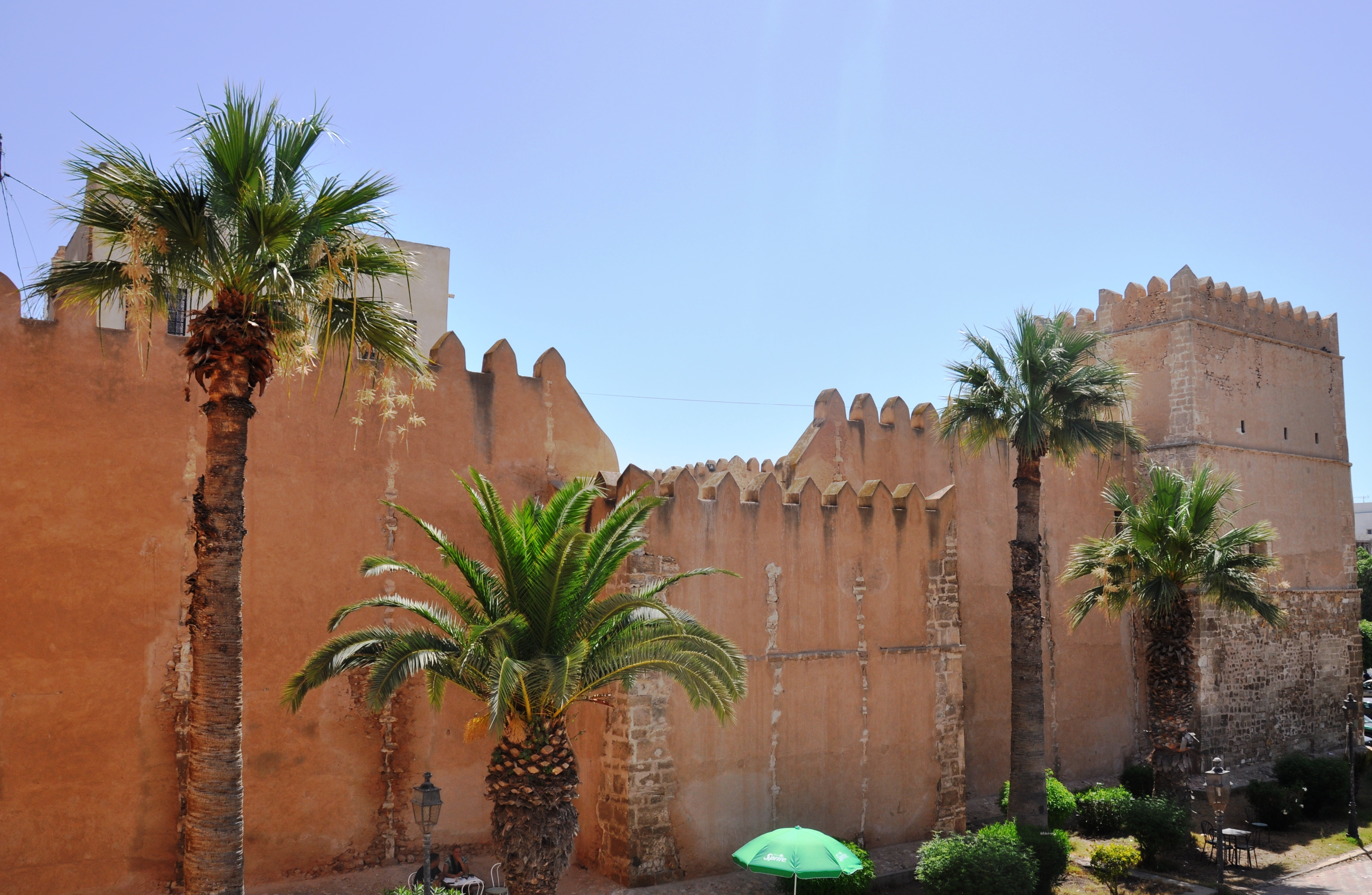 Remparts